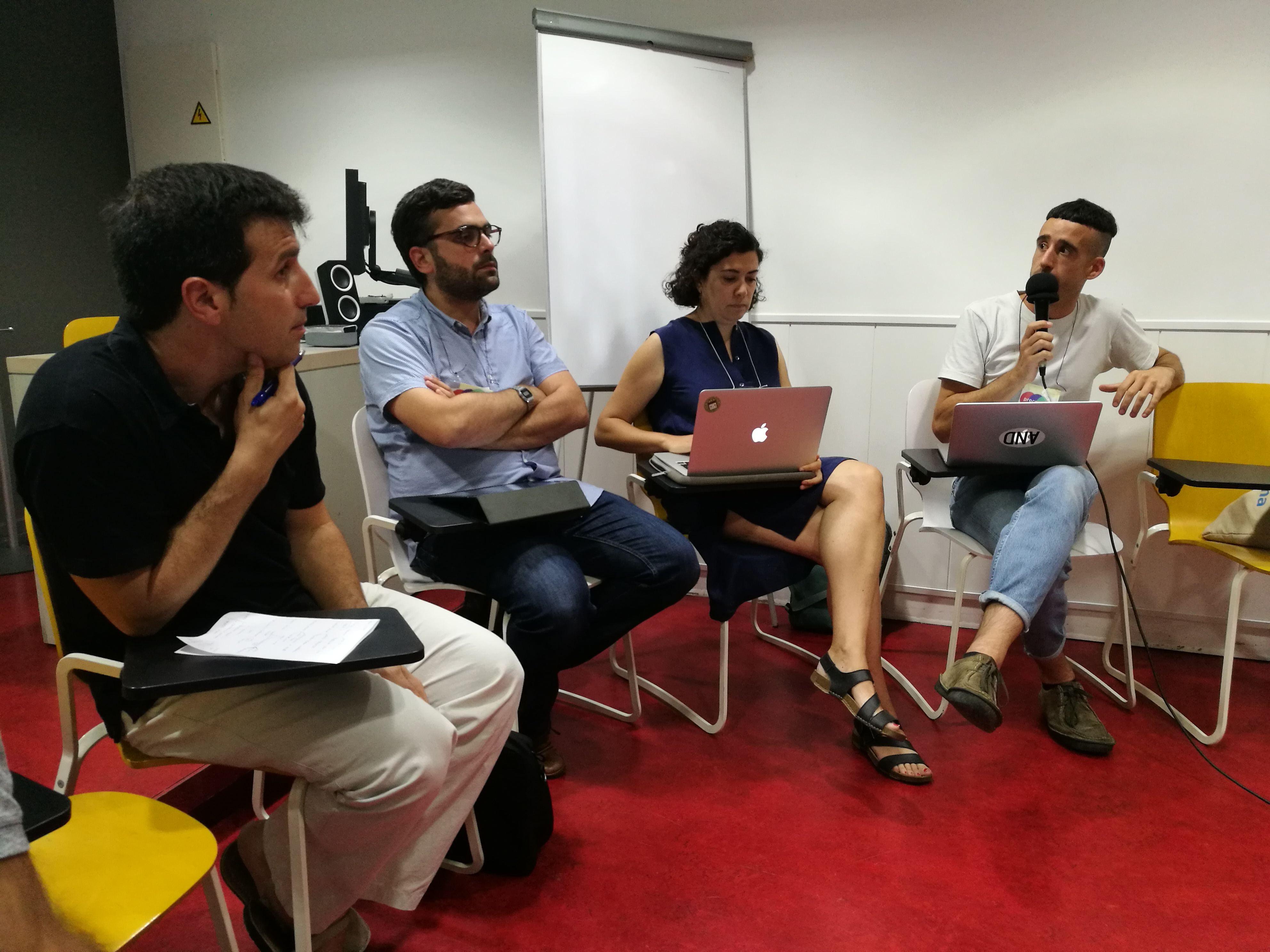 Sessió sobre habitatge amb Marc Parès (IGOP-UAB), Albert Arias (Dir. Turisme, Ajuntament de Barcelona), Adrià Garcia (co-fundador Holon) i altres convidats.